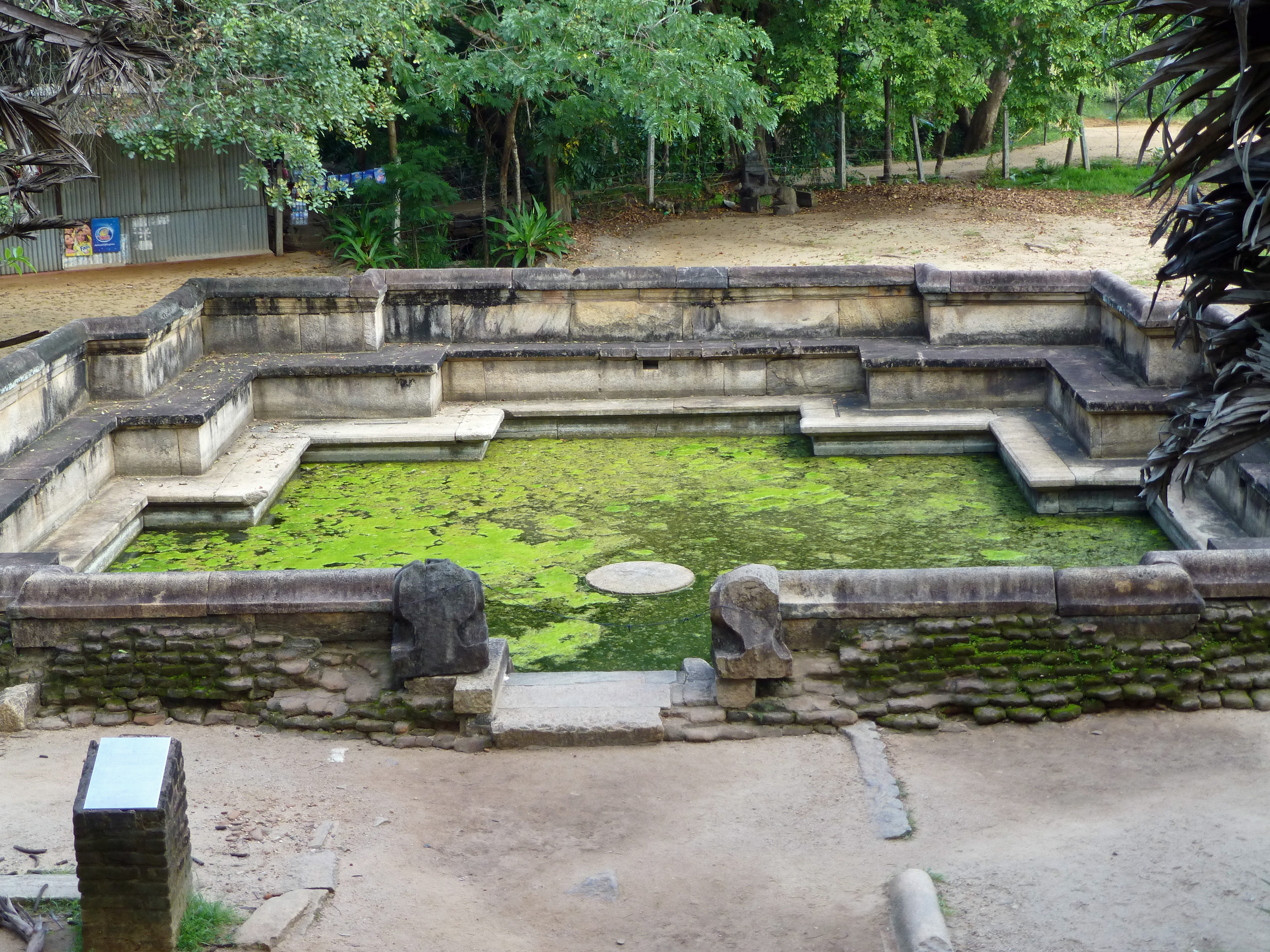 Polonnaruwa (Sri Lanka) : bassin de Kumara Pokuna, probablement construit au 12e siècle et alimenté par un cours d'eau proche